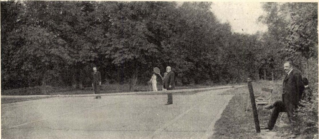 Teniszpálya a geszti Tisza-kastély parkjában (1904)